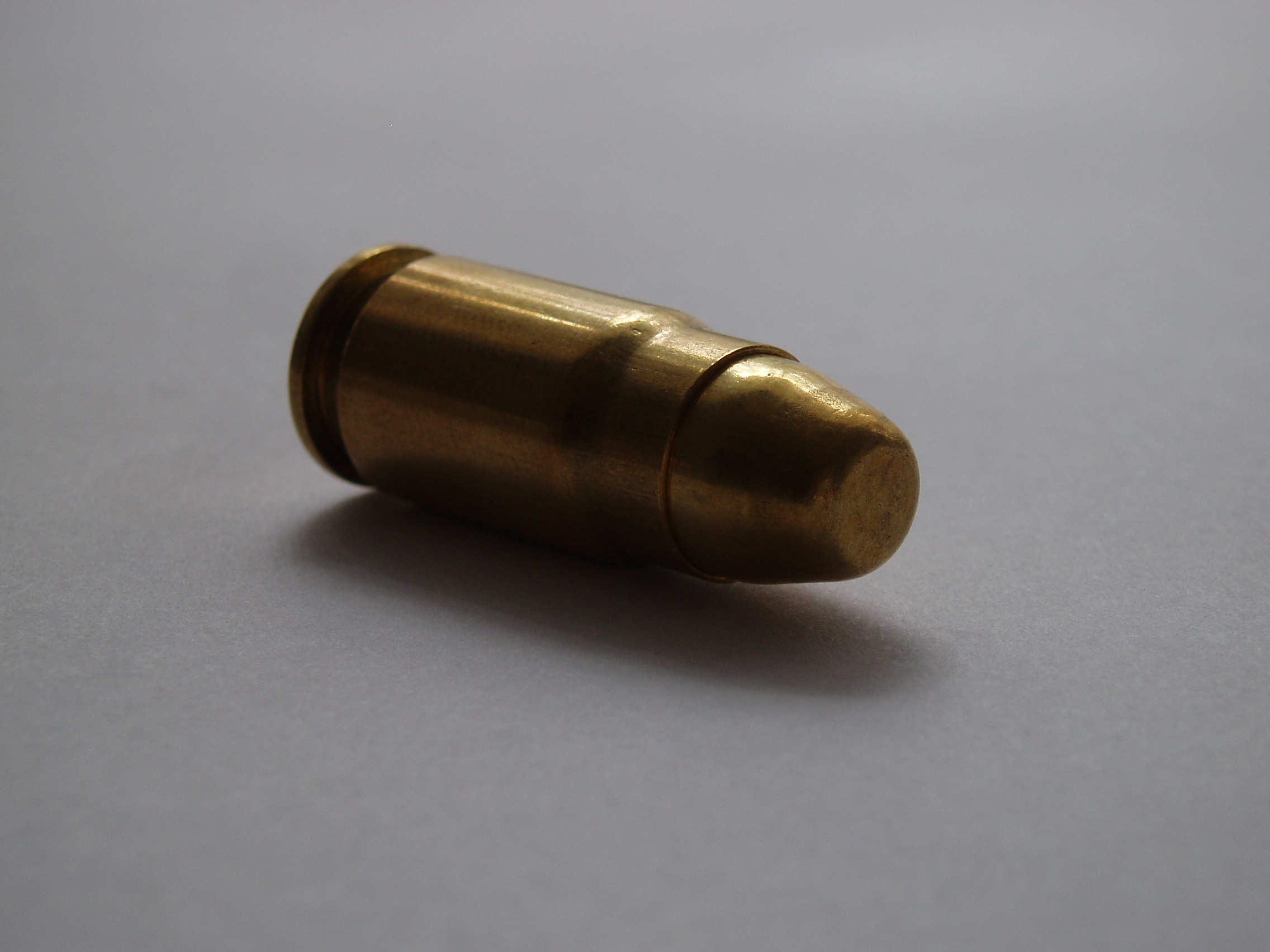 .357 SIG pistol cartrdige. FMJ bullet. Manufacturer: Sellier & Bellot.